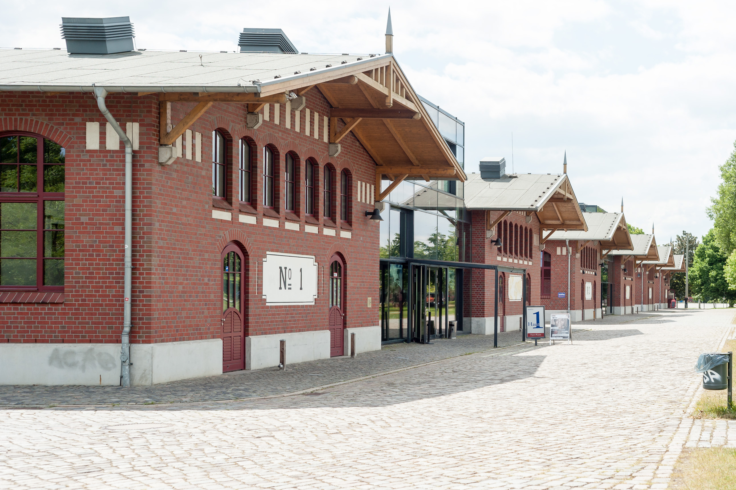 BallinStadt Hamburg